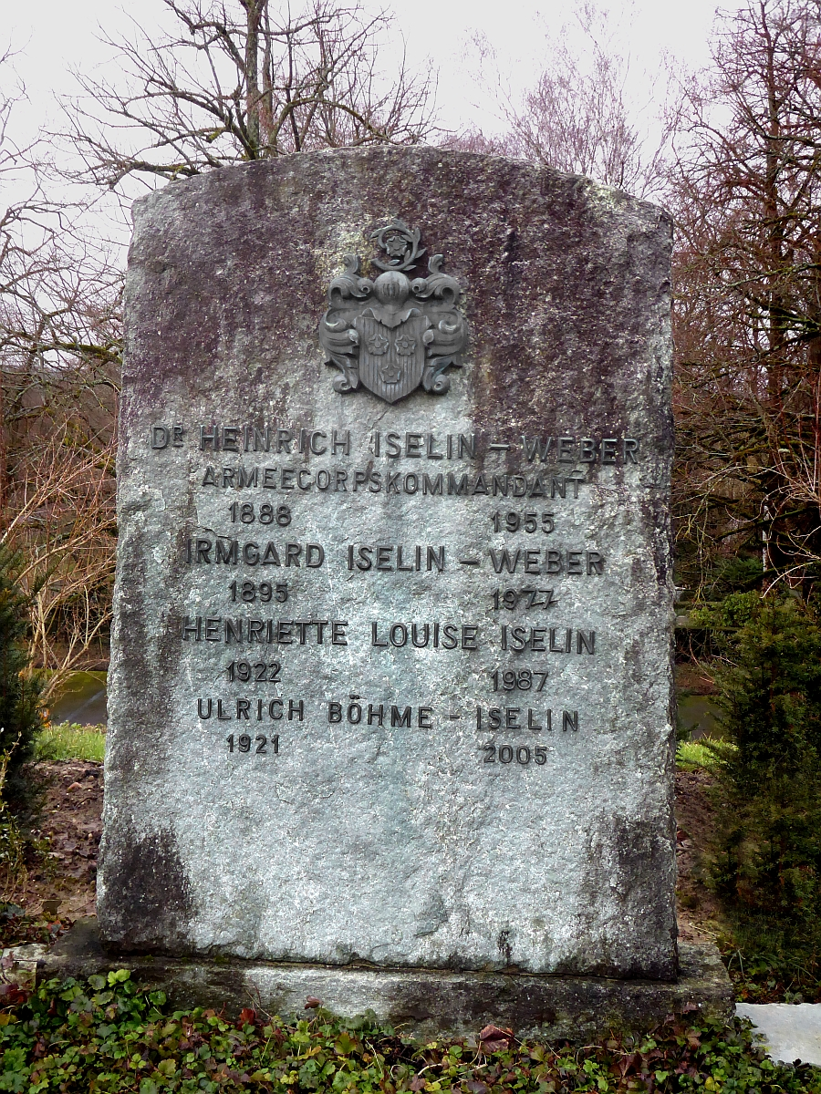 Heinrich Iselin-Weber (1888–1955) Dr.jur., Präsident des Schweiz. Seidenband-Fabrikanten-Vereins. Berufsoffizier, Armeecorps Kommandant, Familiengrab auf dem Friedhof Hörnli, Riehen, Basel-Stadt